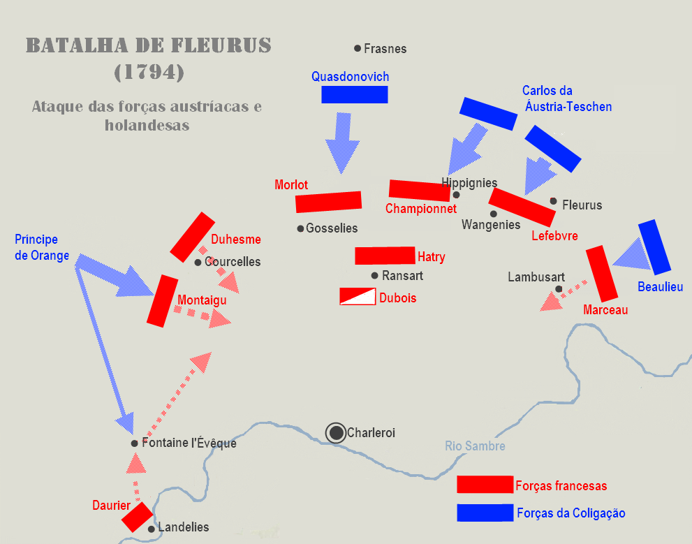 Mapa com as posições iniciais do ataque em Fleurus (1794)